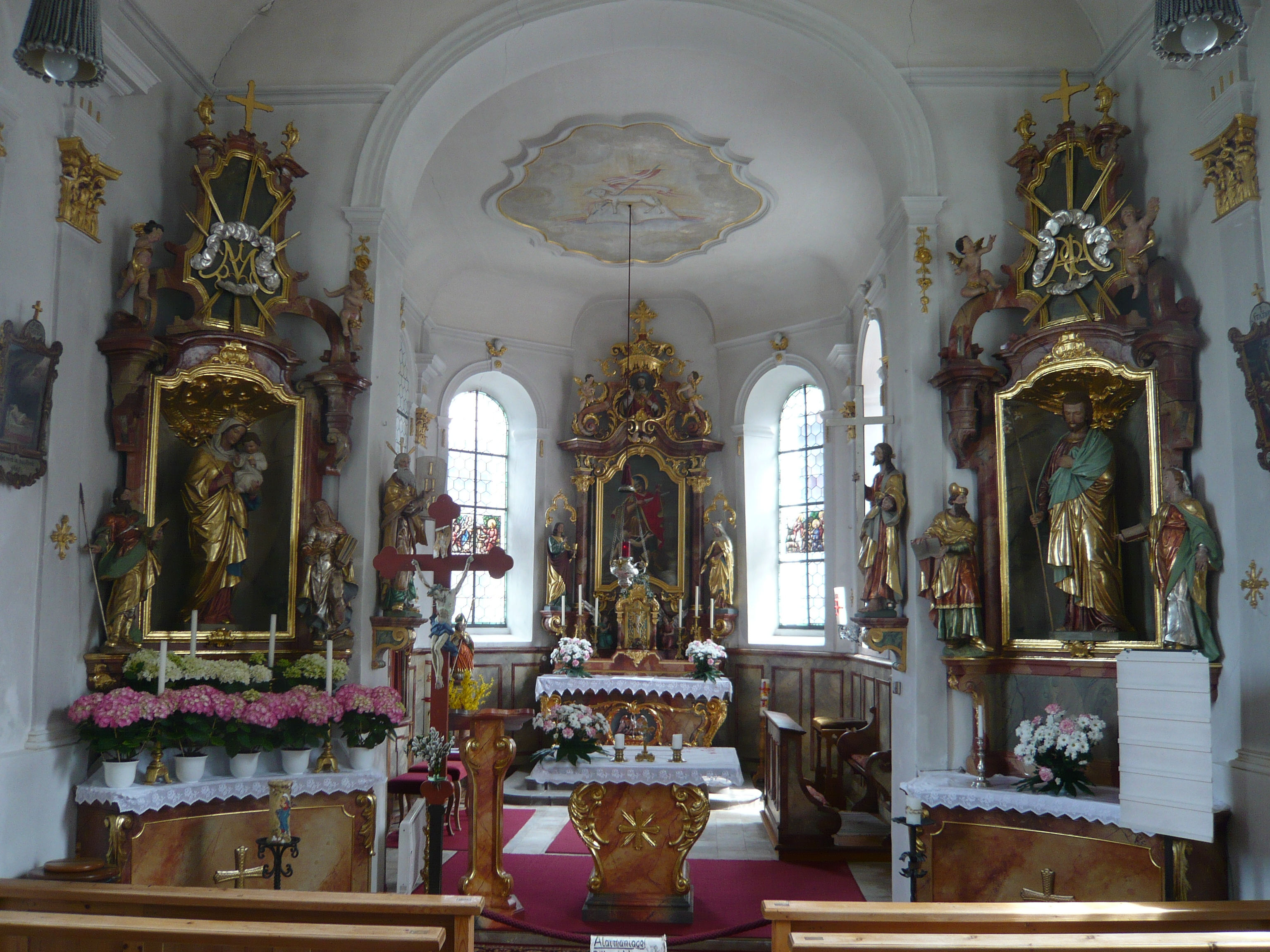 St. Martinskapelle in Kappel, Gemeinde Pfronten, Ostallgäu